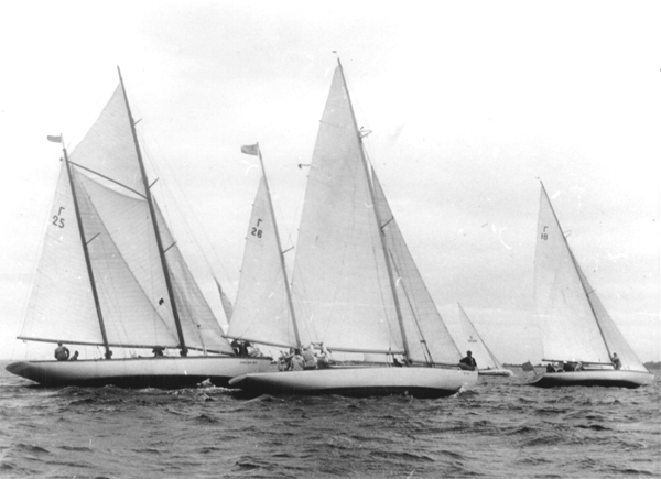 1958 aastal esimese Muhu väina regati ühe etapi start Haapsalu lahel. G18 Brigitta, G26 Eha, G25 Vanemuine, G26 Eha.